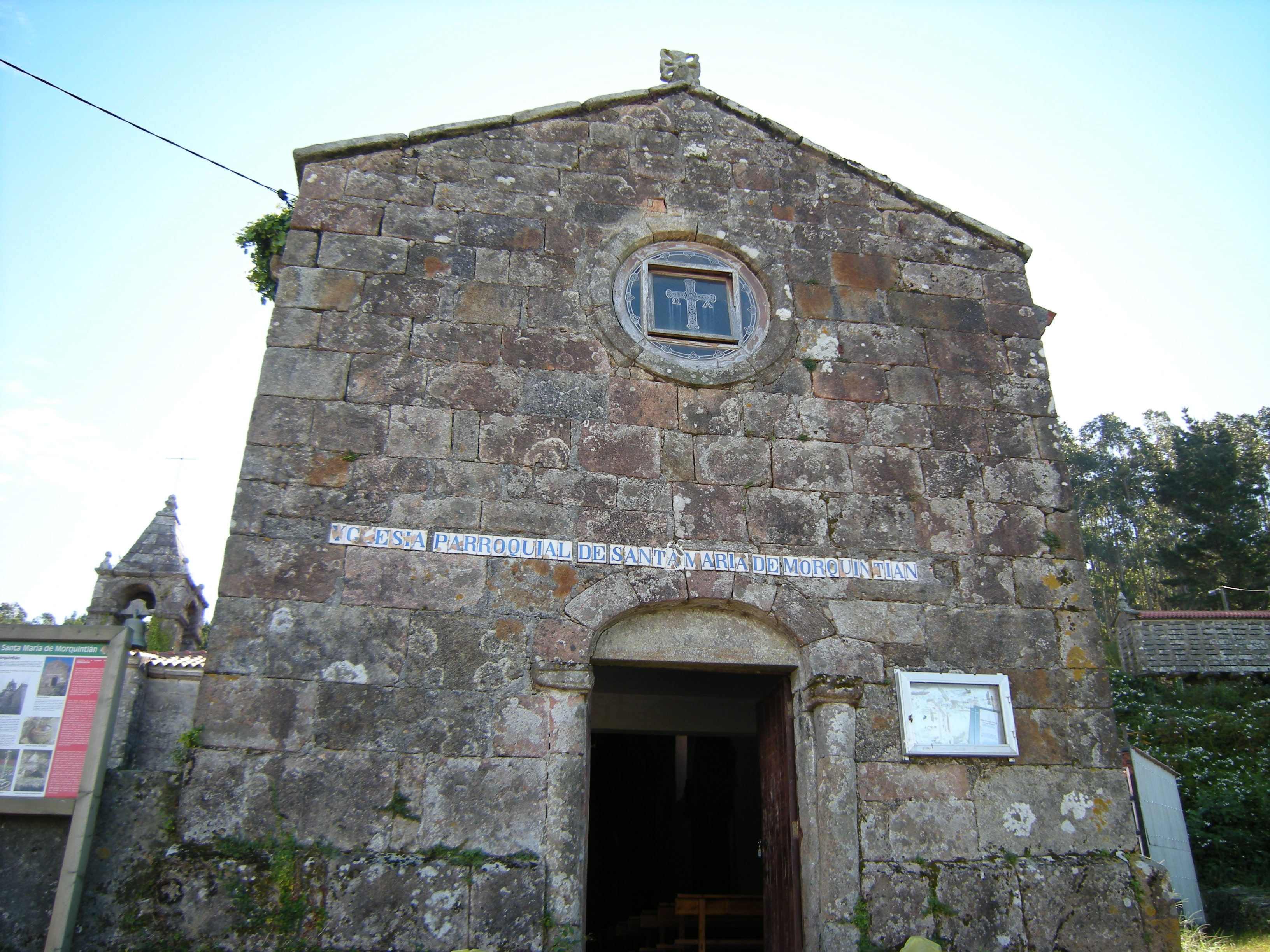 Hastial occidental.